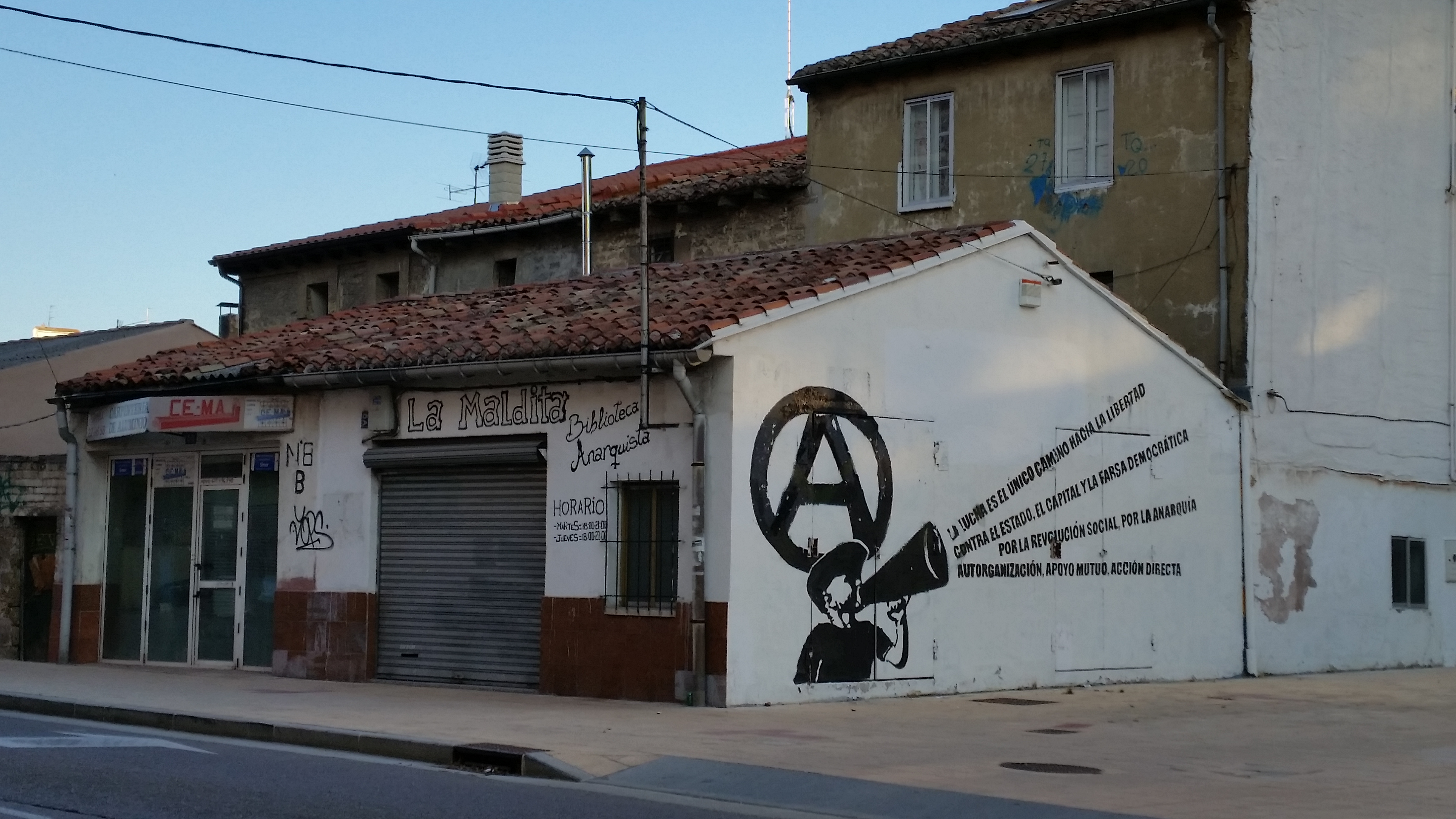 Burgos - Gamonal - Biblioteca anarquista La Maldita